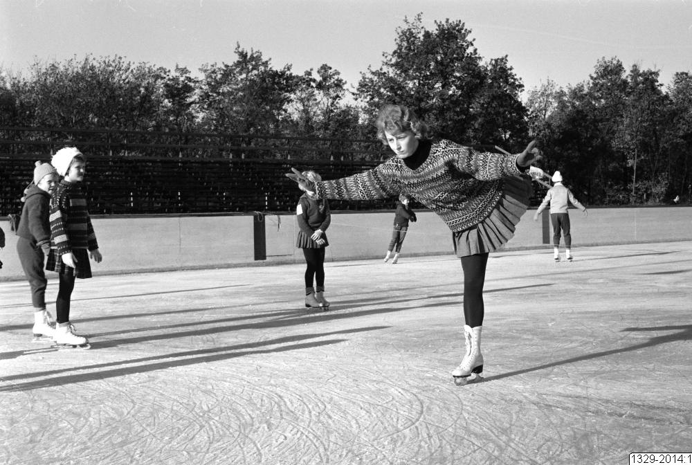 Utomhusisbanan vid Olympia i Helsingborg 1961.